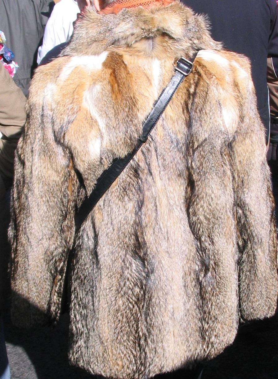 Graufuchsjacke. Düsseldorf, Königsallee, 2012.